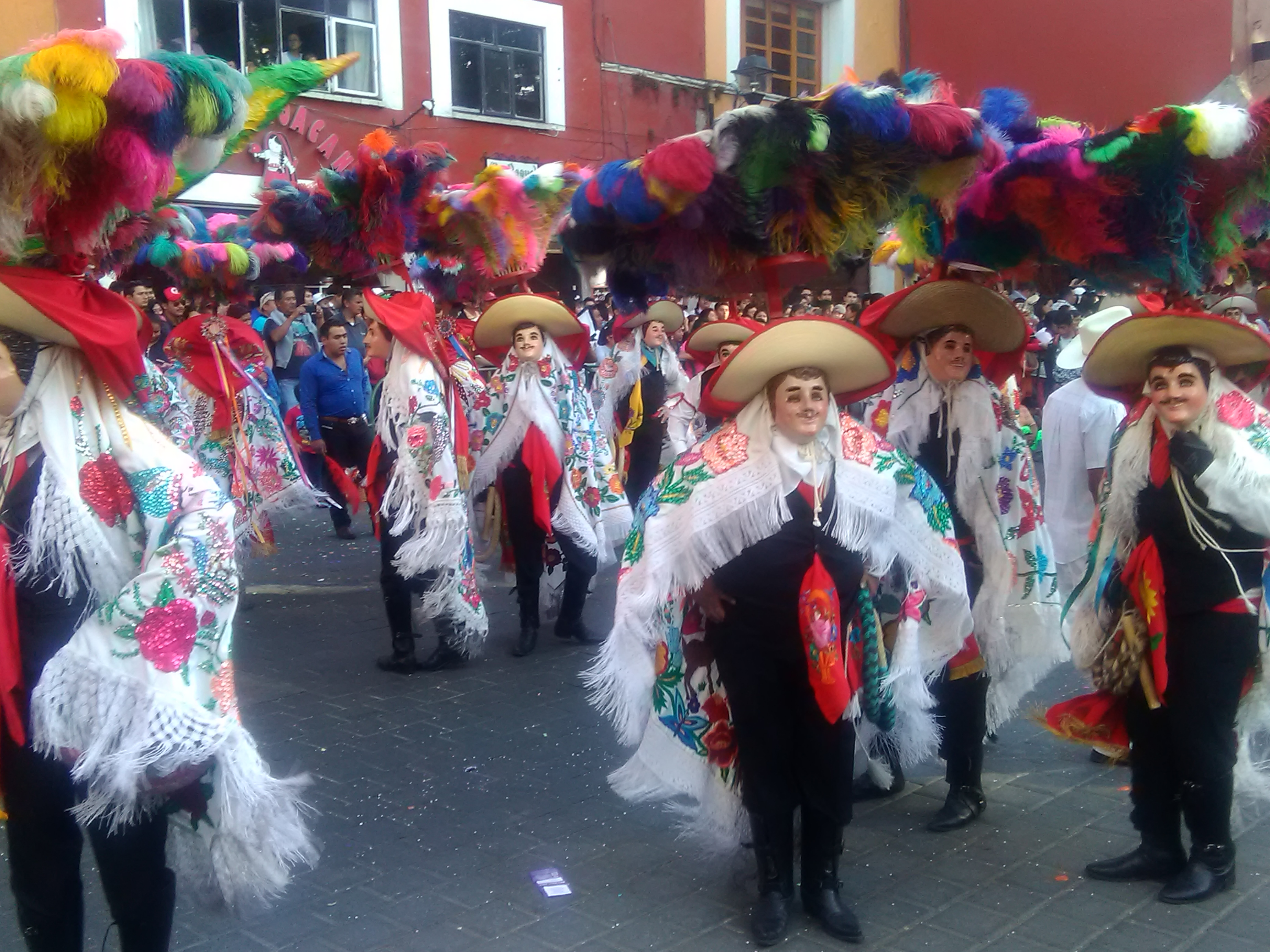 Charros de Papalotla, Tlaxcala